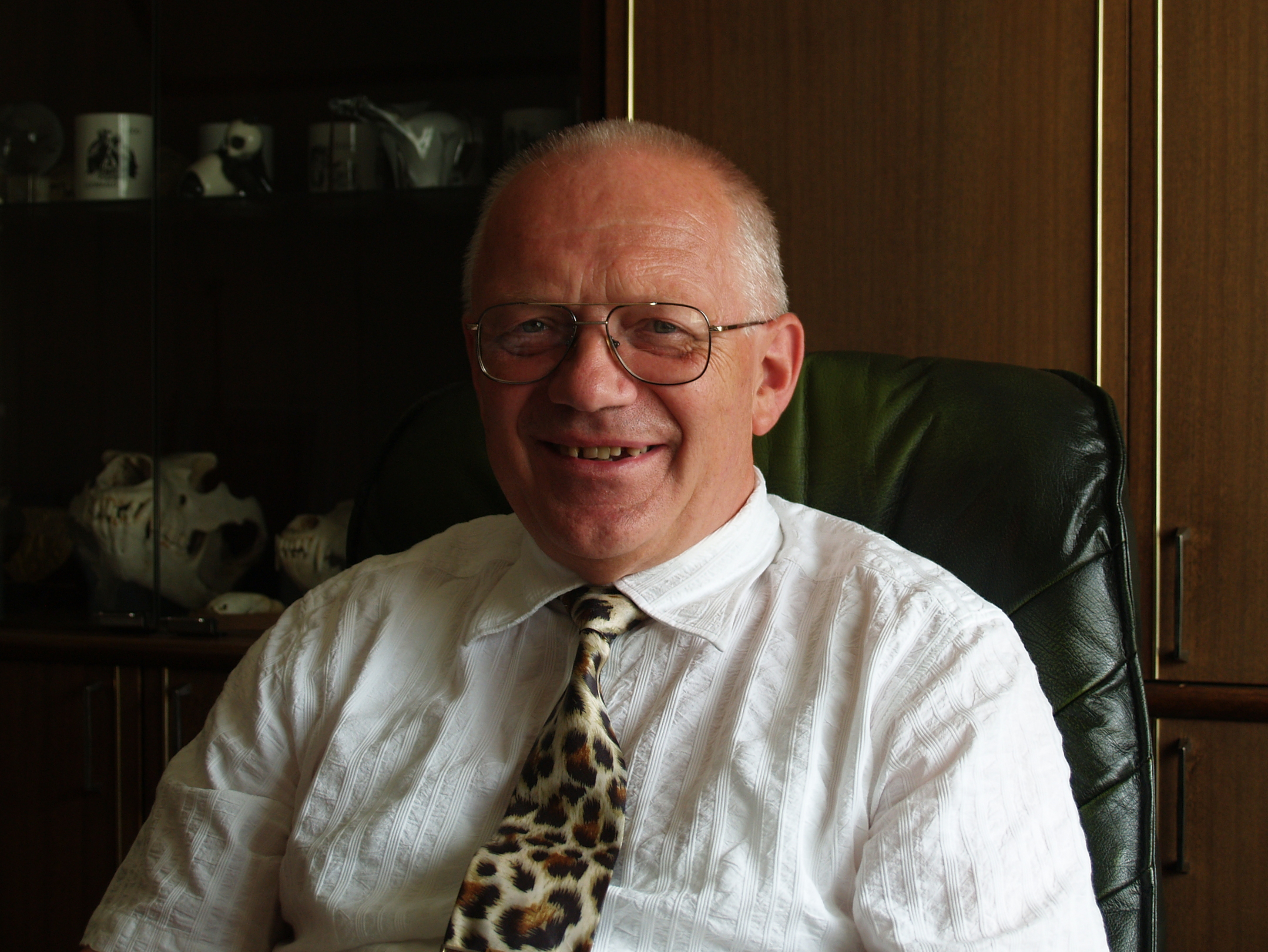 Mati Kaal enda kabinetis Tallinna Loomaaias.